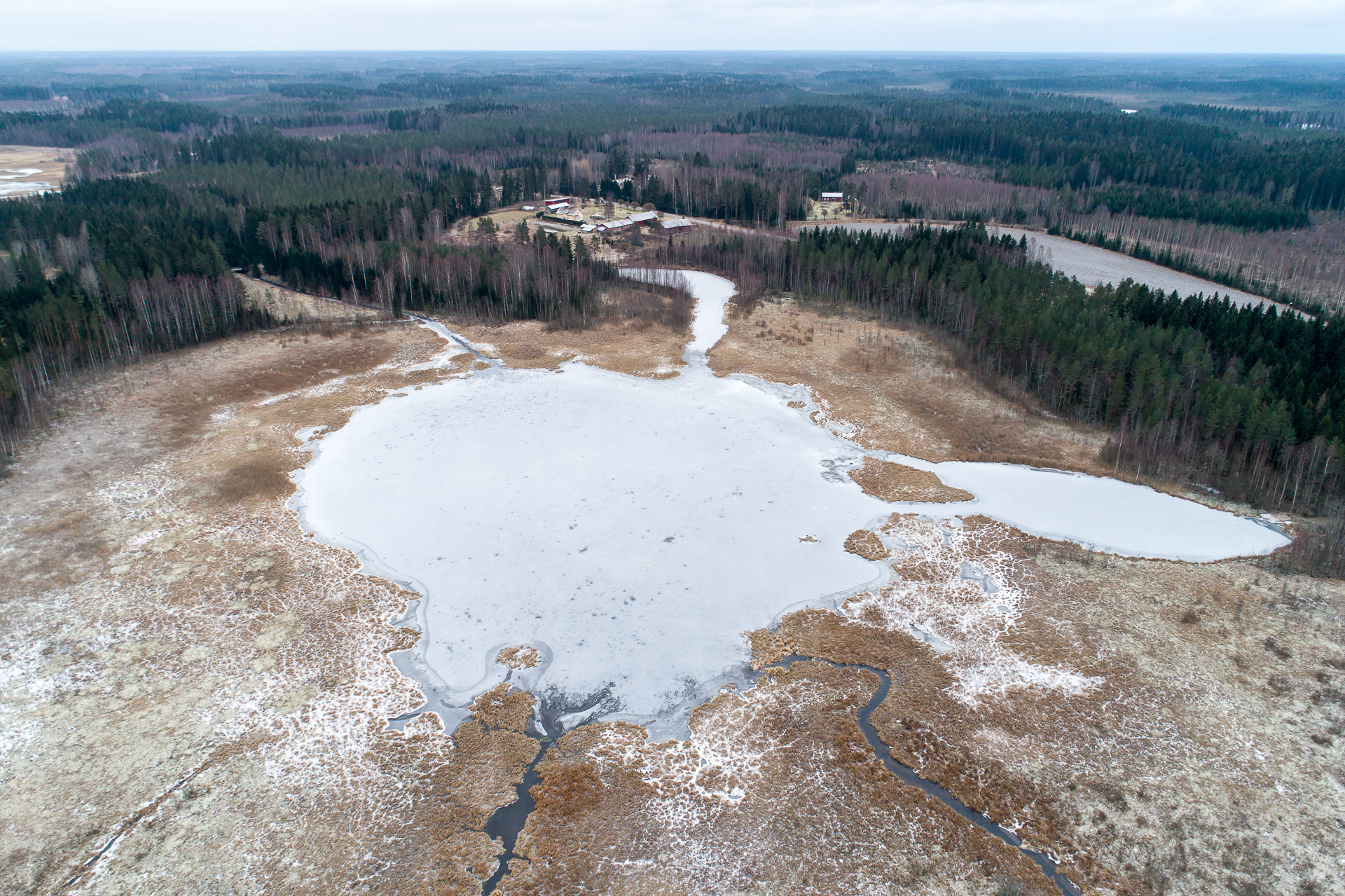 Etualalla Lamminjärvi Kairilassa, Porissa.